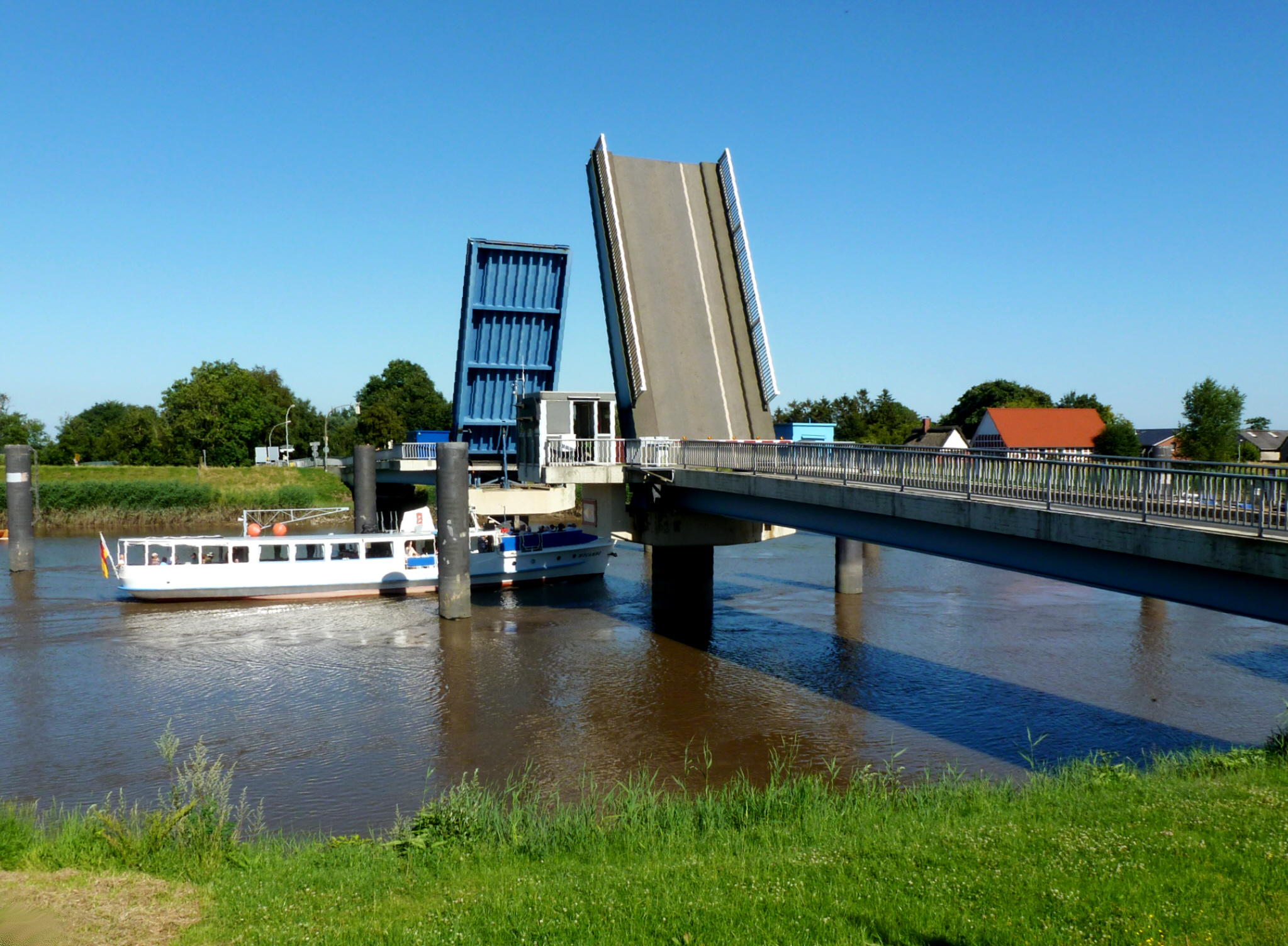 Das Fahrgastschiff Mocambo passiert auf der Oste die Klappbrücke bei Oberndorf, Landkreis Cuxhaven, DE. Indienststellung der Klappbrücke im Jahre 1977, vorher Betrieb einer Prahmfähre zwischen Oberndorf und Bentwisch durch die Familie v. See.